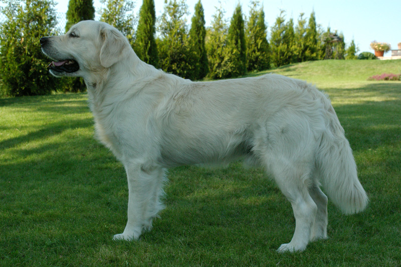 Cofi; Pies Golden retriever.